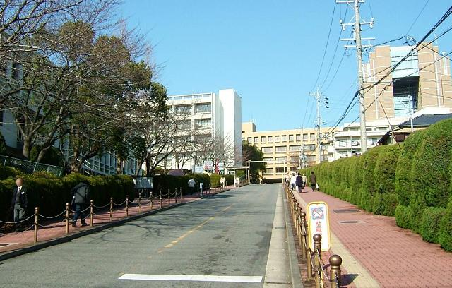 名古屋市天白区塩釜口に所在する学校法人名城大学の名城大学天白キャンパスの正門。この天白キャンパスには名城大学の法学部・経営学部・経済学部・理工学部・農学部・人間学部がある。また春には画面左側の桜並木が名古屋市有数の桜の名所として有名である。投稿者 Gnsin 撮影日&場所 2005年2月9日(水) 名古屋市天白区の名城大学天白キャンパス正門前にて撮影。Category:大学の画像ja:Category:天白区の画像